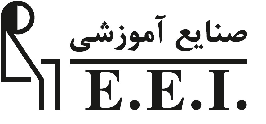 لوگو شرکت صنایع آموزشی